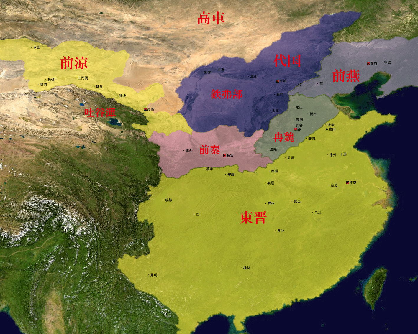 五胡十六国時代の冉魏、東晋、前秦、前燕、前涼、代国の領域。